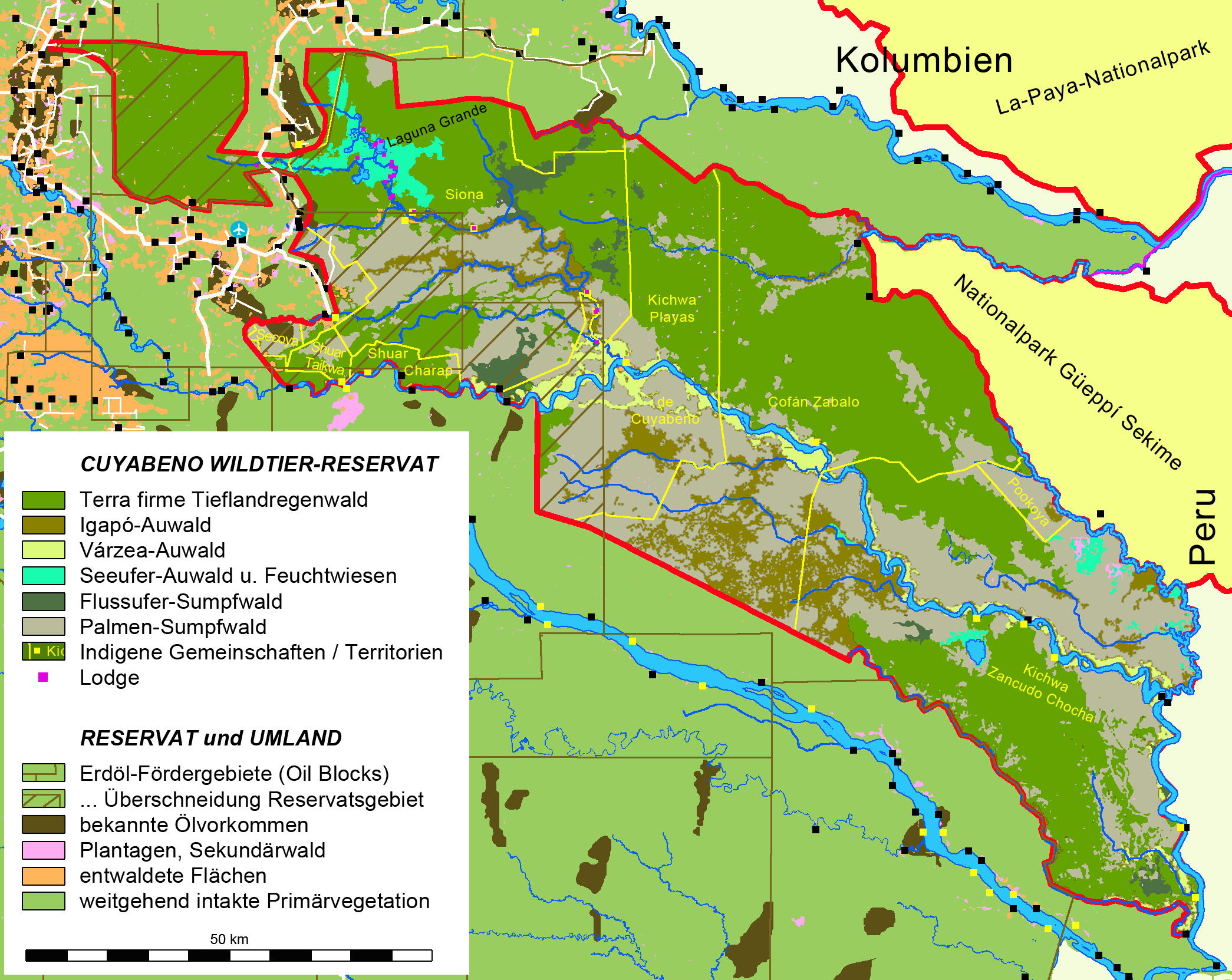 Karte des Wildtier-Reservates Cuyabeno